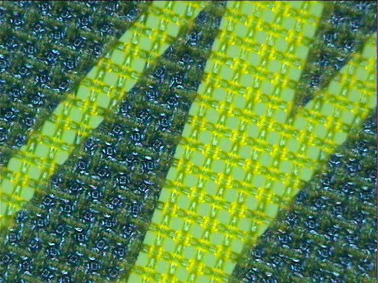 Siebdruck, ein N